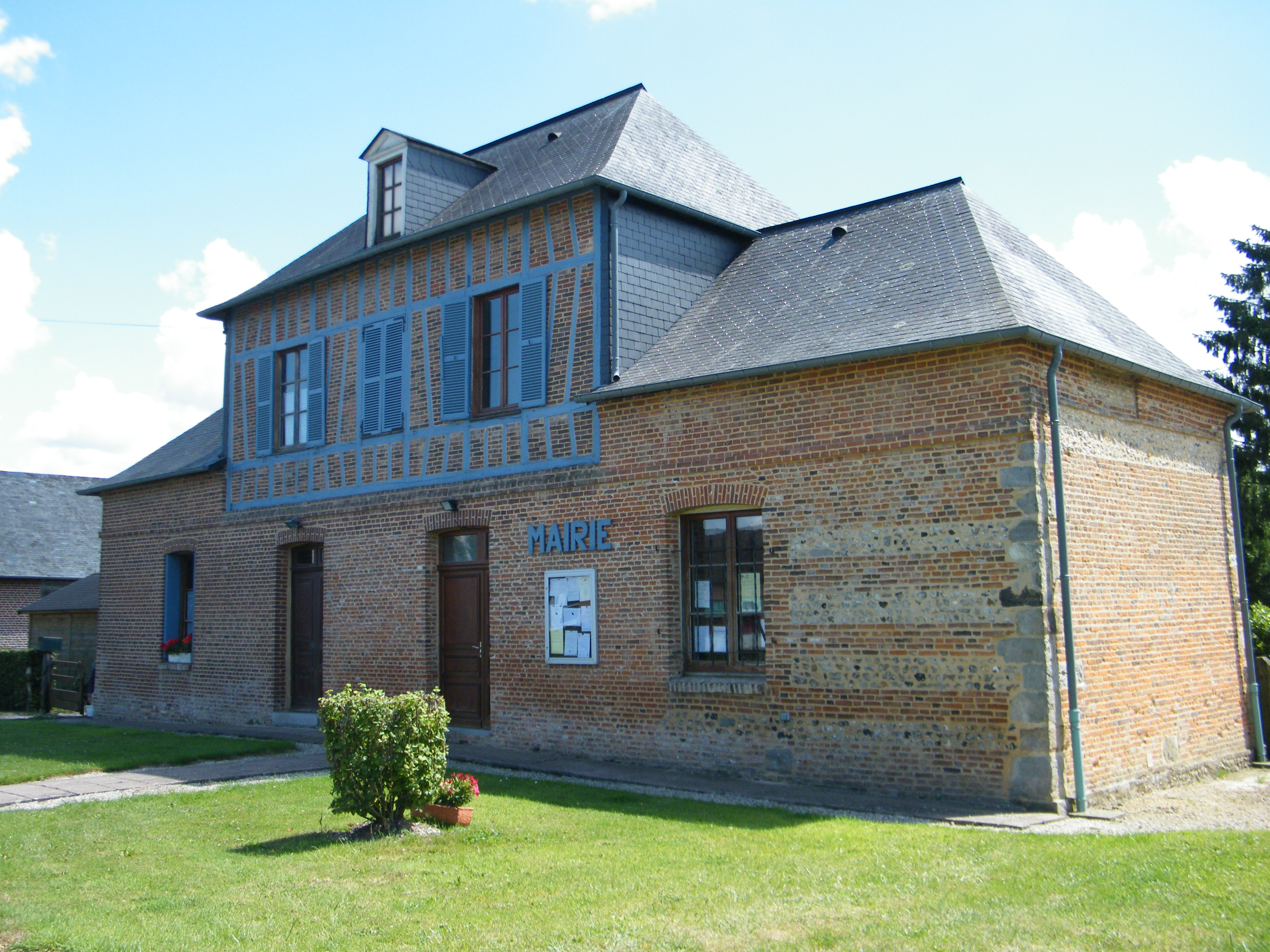 Bailleul-Neuville, Seine-Maritime, France, mairie